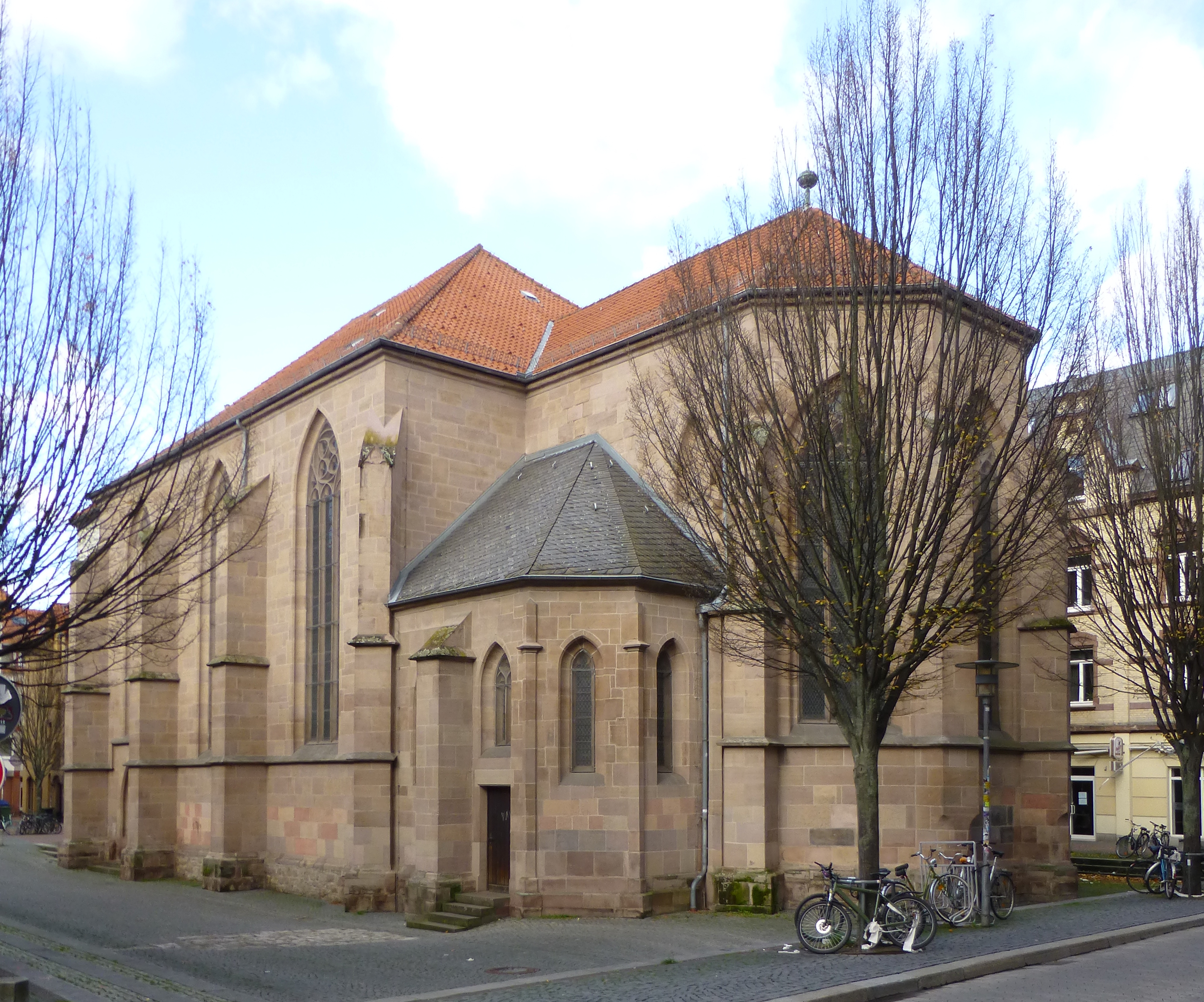 Südostansicht der ev.-luth. Universitätskirche St. Nikolai in Göttingen, Südniedersachsen